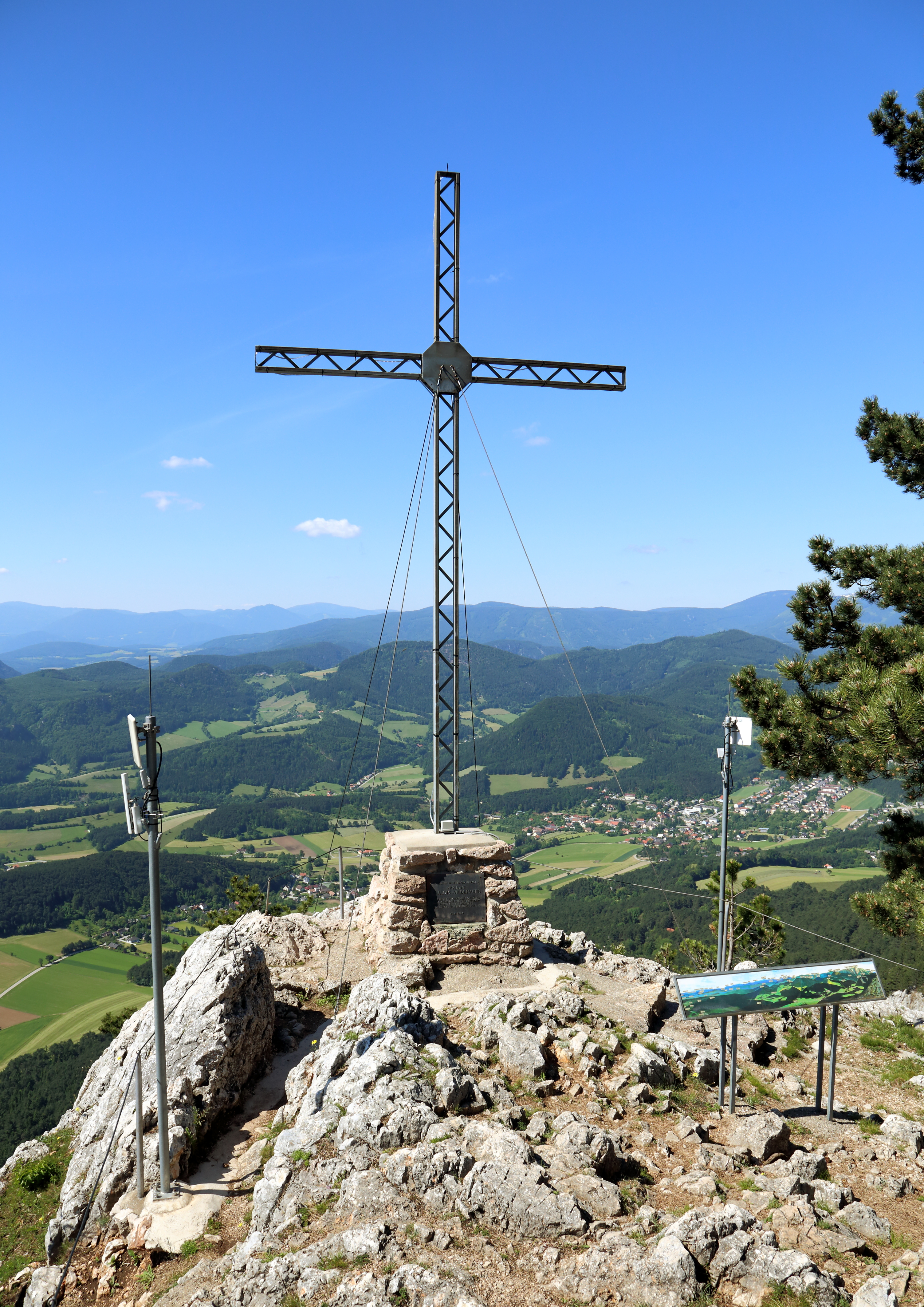 Wildenauer-Gedenkkreuz an der Großen Kanzel auf der Hohen Wand mit Grünbach am Schneeberg im Hintergrund. Am Sockel ist eine Gedenktafel mit folgender Inschrift angebracht: Gewidmet dem Bergkameraden Prälat Dr. Alois Wildenauer vom Österreichischen Touristenklub, Sekton Wiener Neustadt unter seinem Vorstand Vizebürgermeister Alois Pollak 15. 6. 1969 - Alois Wildenauer (1877-1967) gilt als Erschließer der Hohen Wand.